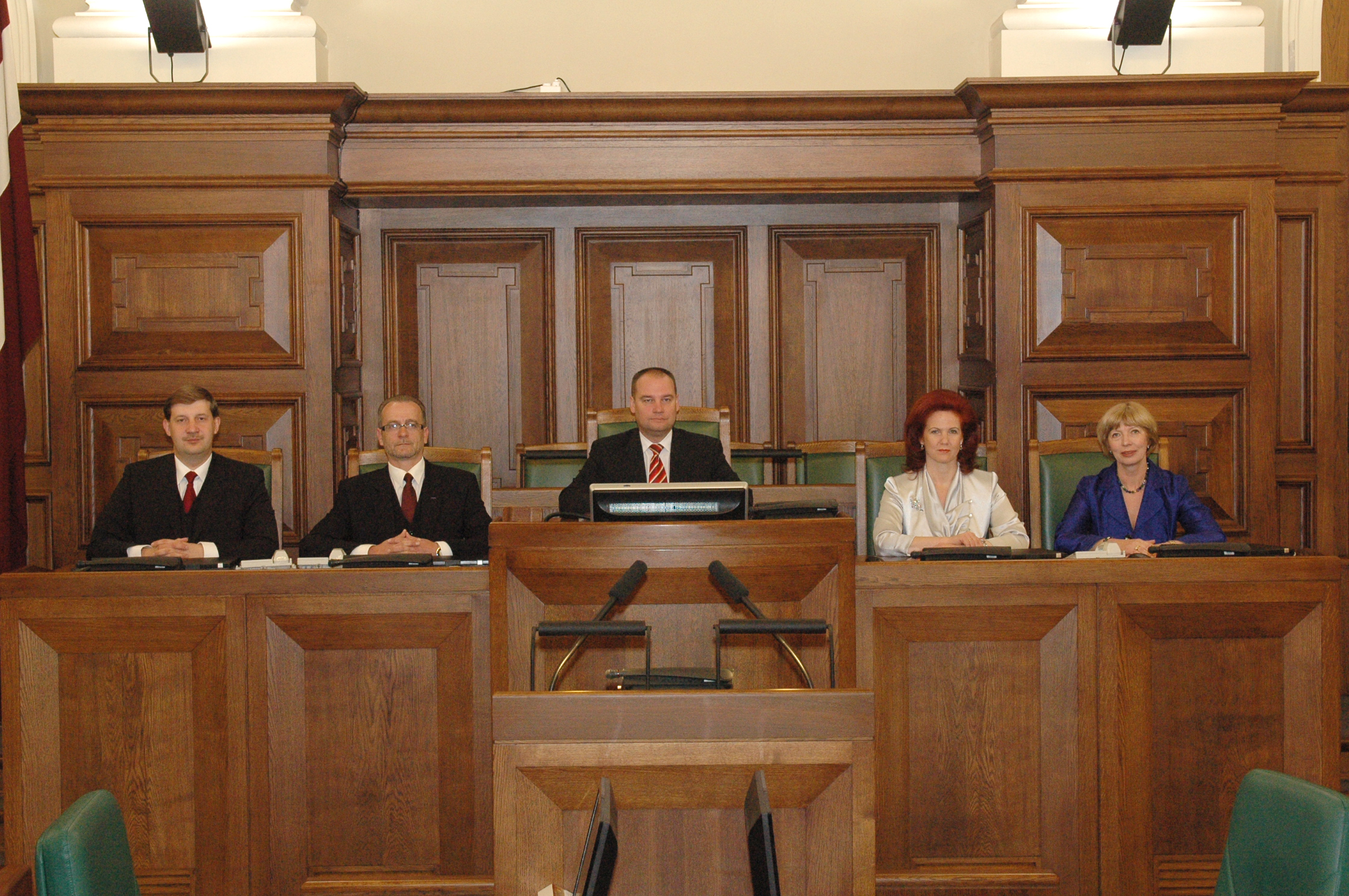 Saeimas Prezidijs 2010.gada 4.maijā